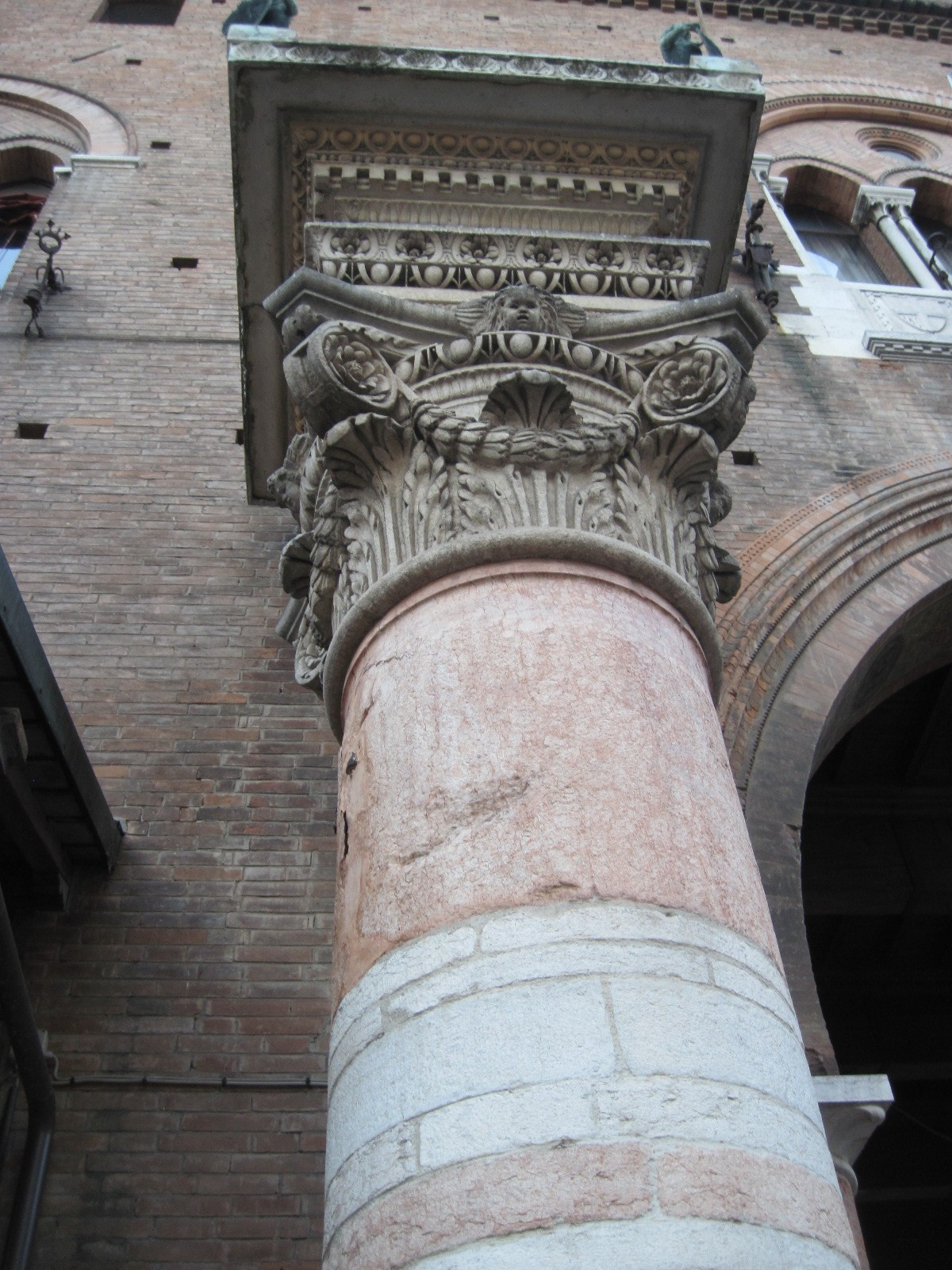 Ferrara, Palazzo comunale, colonna del duca Borso d'Este costruita con le lapidi asportate dal Cimitero ebraico di via delle Vigne